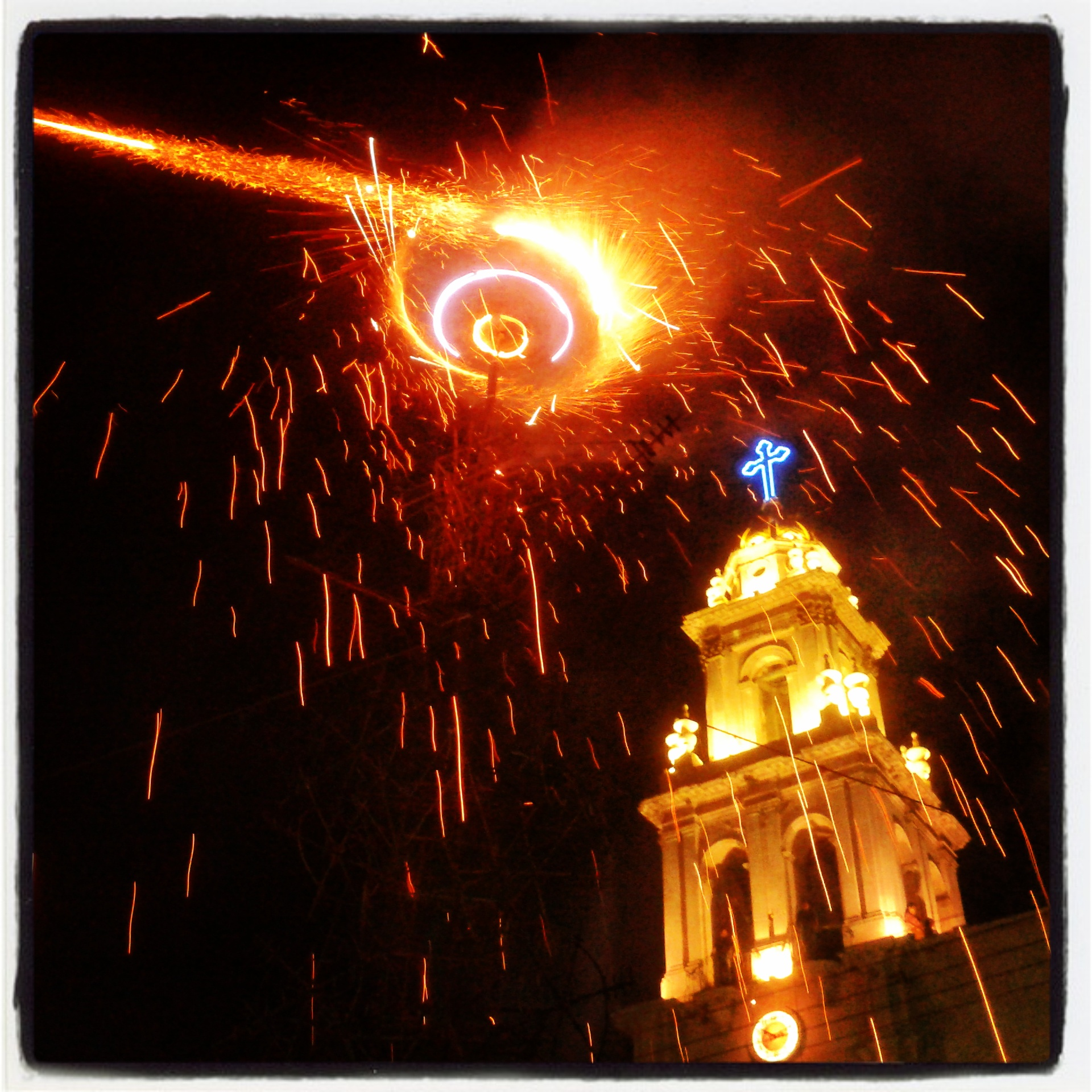 Durante el novenario de San Miguel Arcángel en Cocula Jalisco